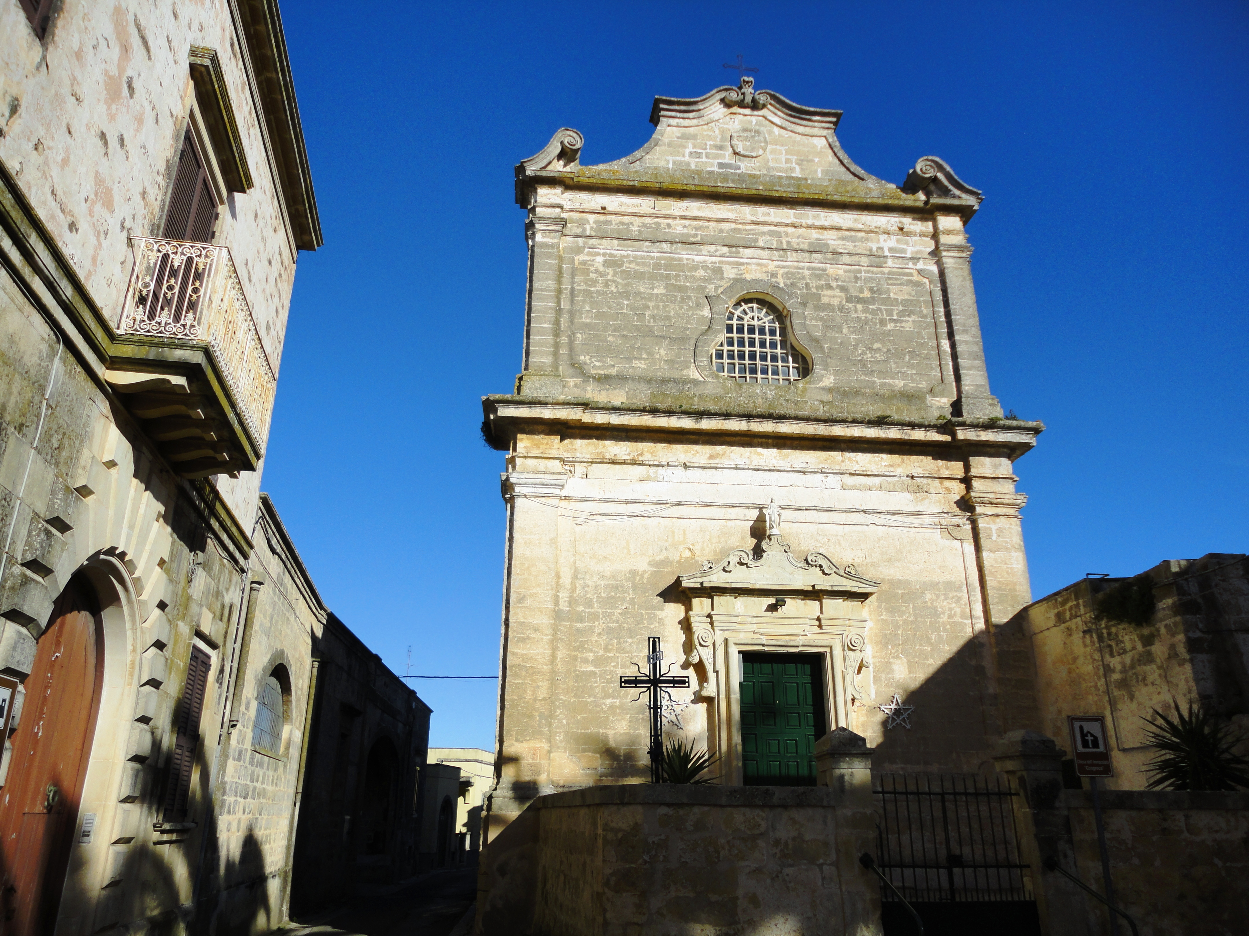 Cappella dell'Immacolata Spongano, Lecce